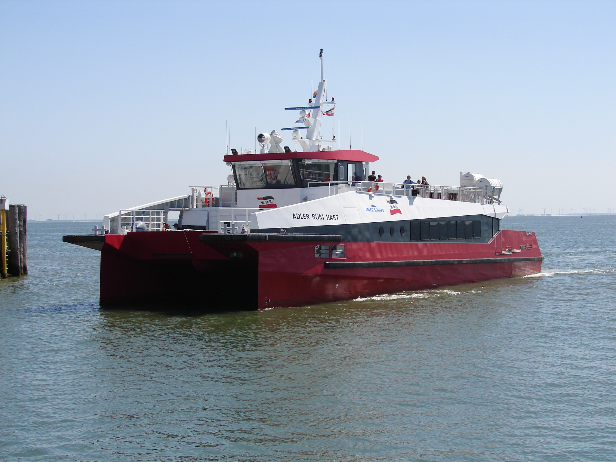 Katamaran MS Rüm Hart beim Anlegen in Wyk auf Föhr im Sommer 2019